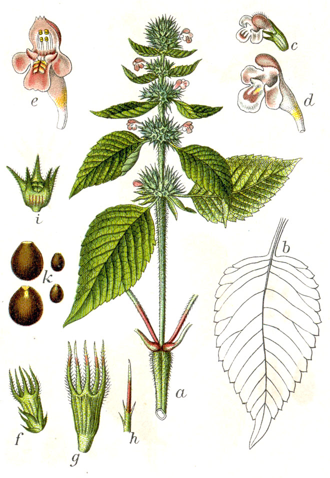 Galeopsis tetrahit L. Original Caption Gemeine Hanfnessel, Galeopsis tetrahit